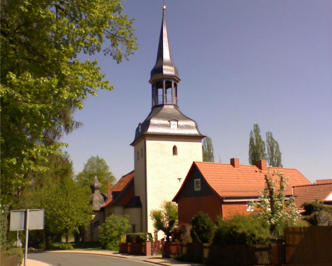 Kirche Wrisbergholzen in Westfeld